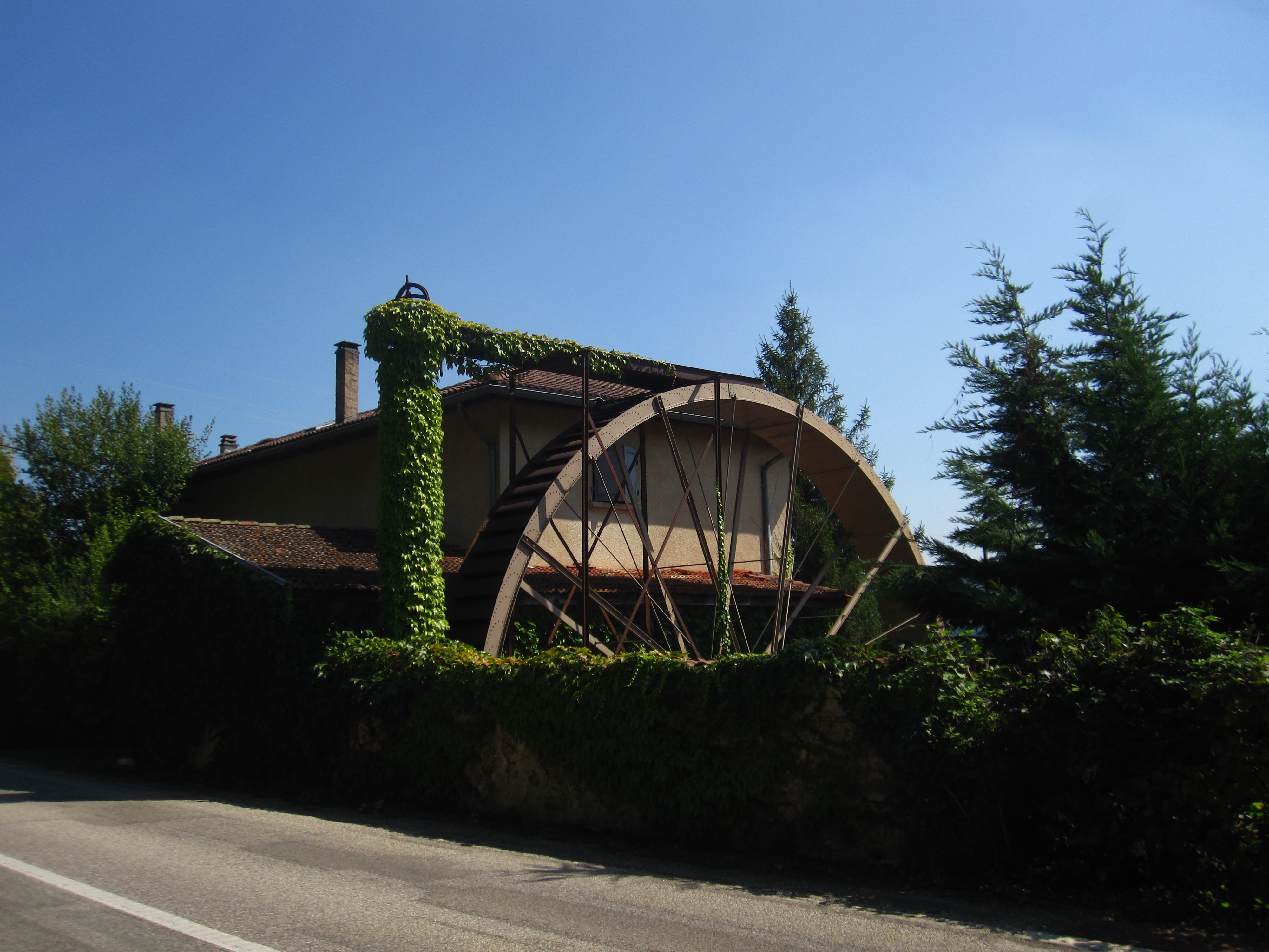 Photo du Moulin de Nantoin pris de la D51 This building is en partie classé, en partie inscrit au titre des Monuments Historiques. .